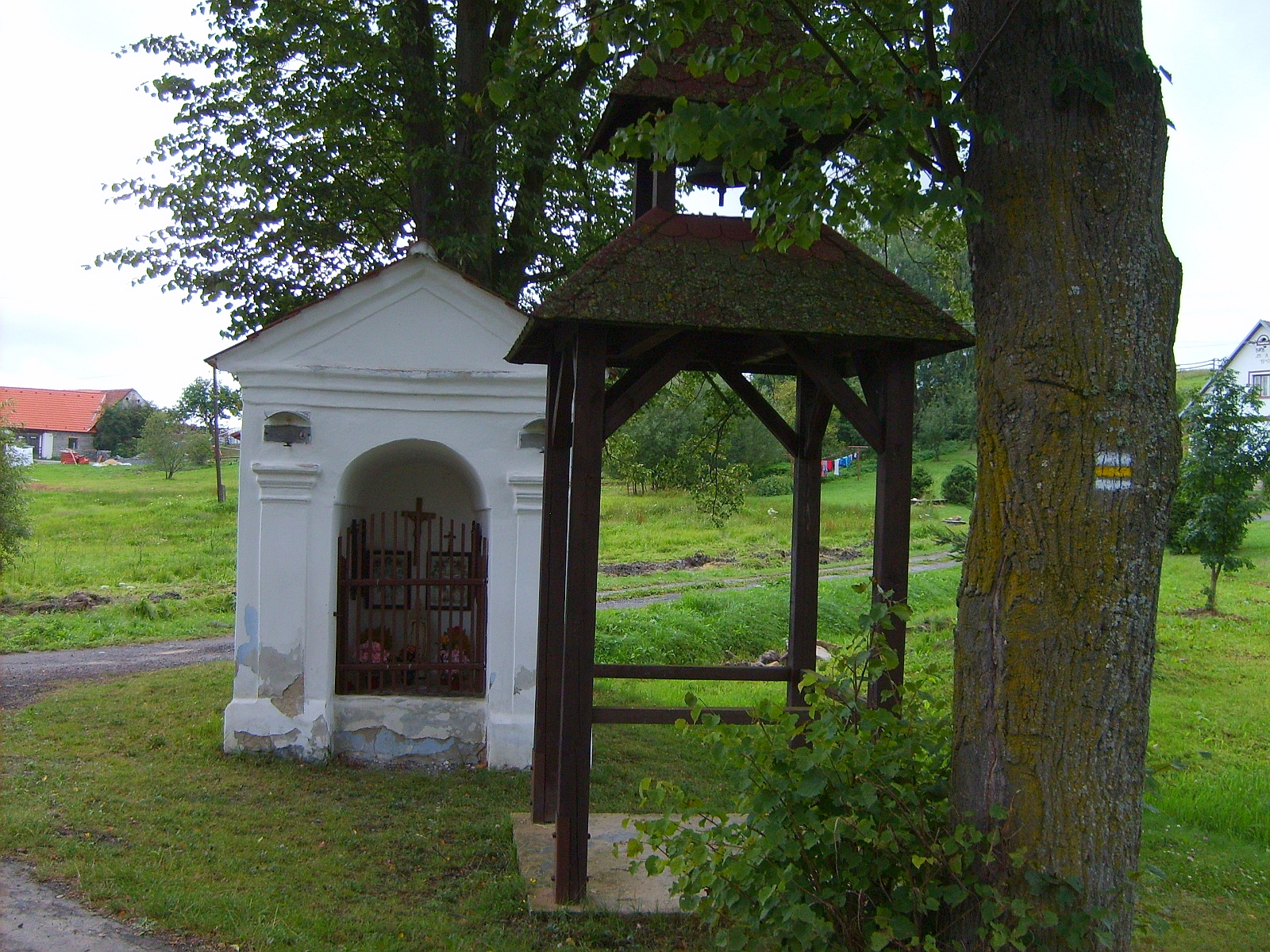 Dluhoště chapell. Benešov nad Černou municipality